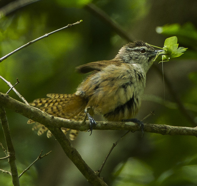 Plain Wren - Chiapas - Mexico_S4E7285